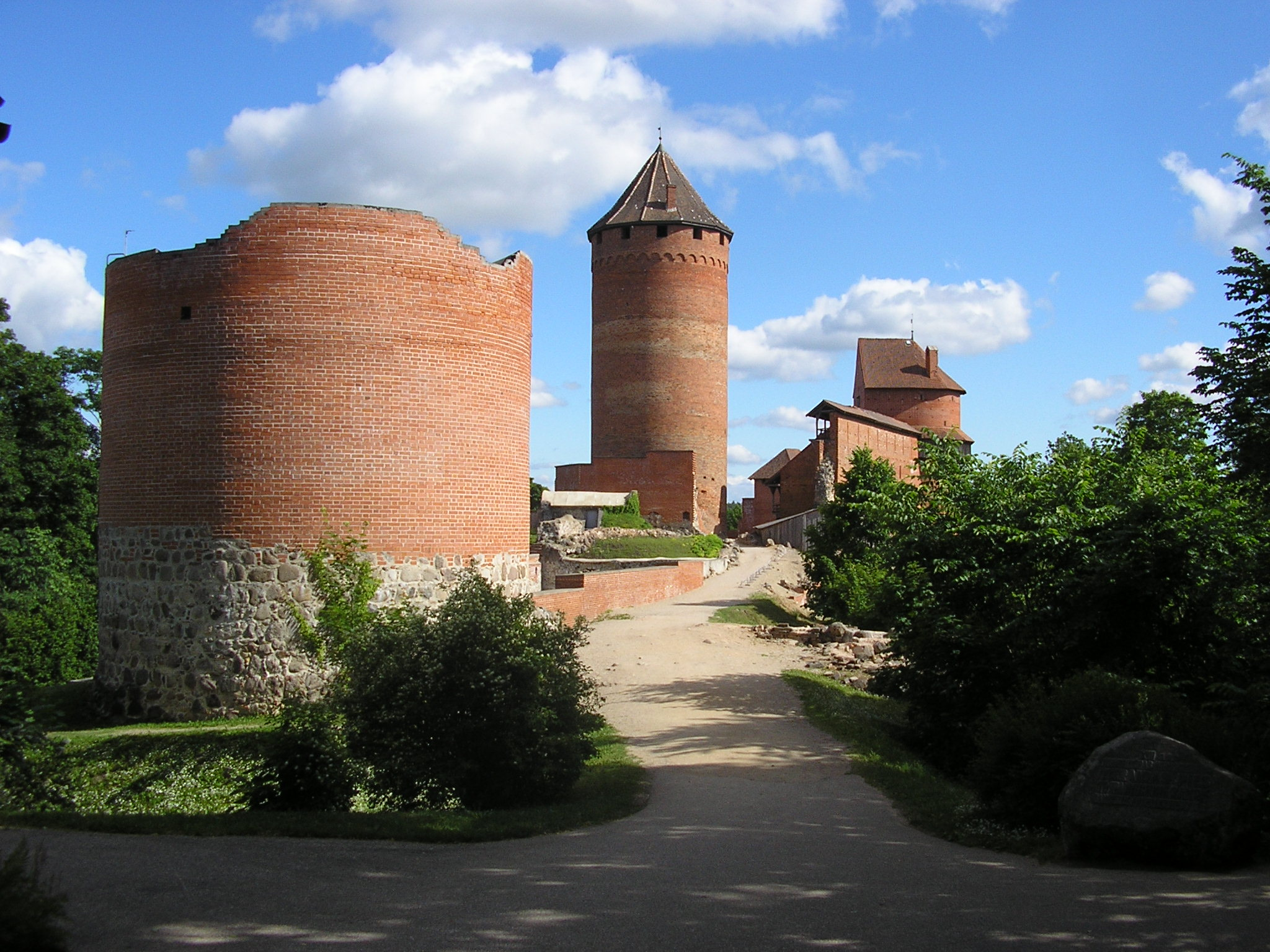 Turaidas pils (Turaida Castle).